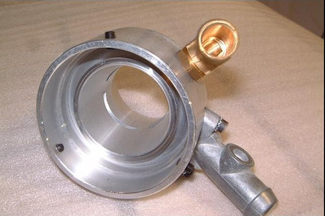 Mischer für Autogas nach dem Venturi-Prinzip